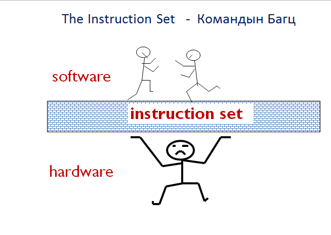 Монгол: Instruction